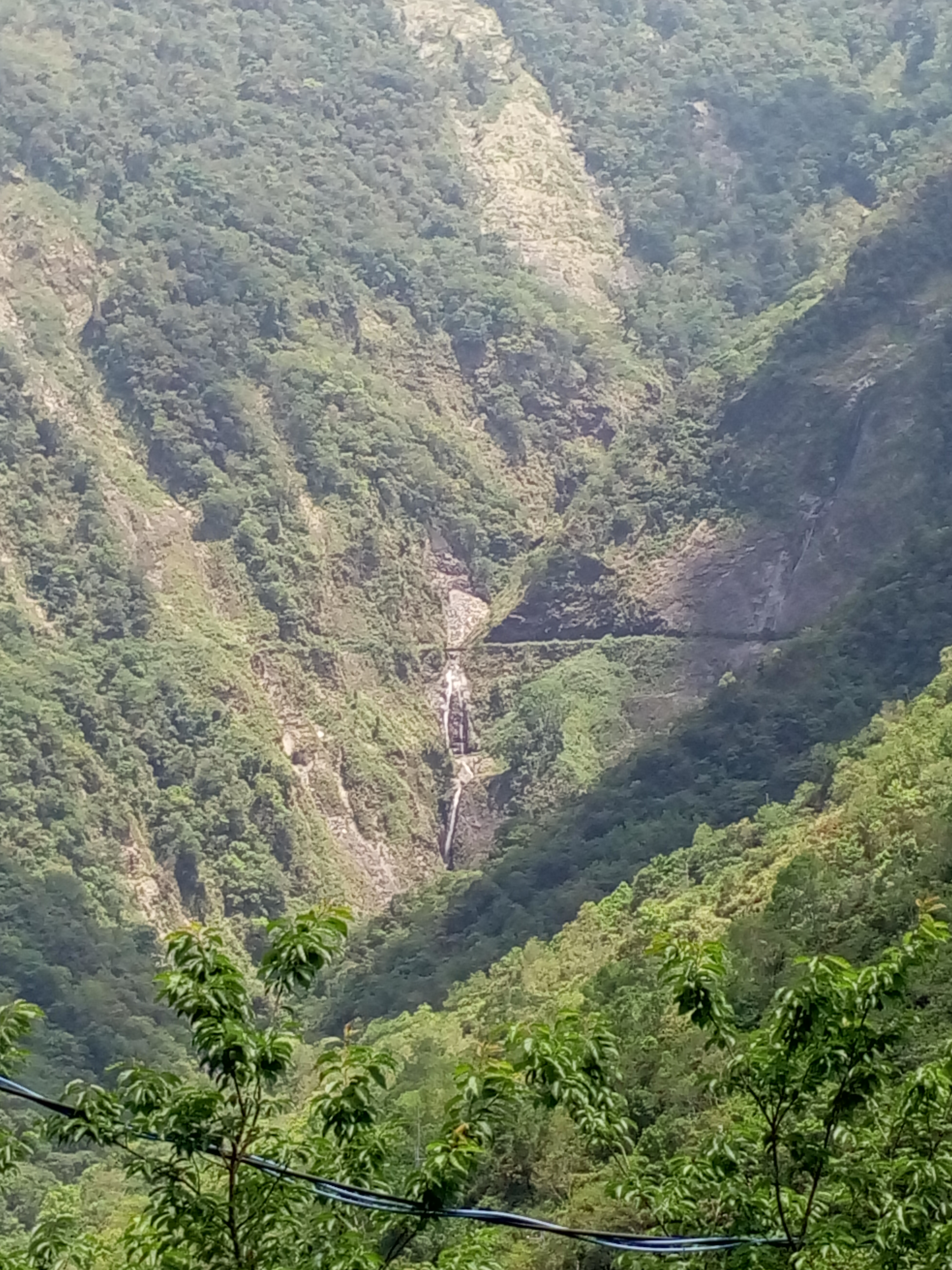 中文（台灣）: 屏東縣霧台鄉阿禮部落小鬼湖林道